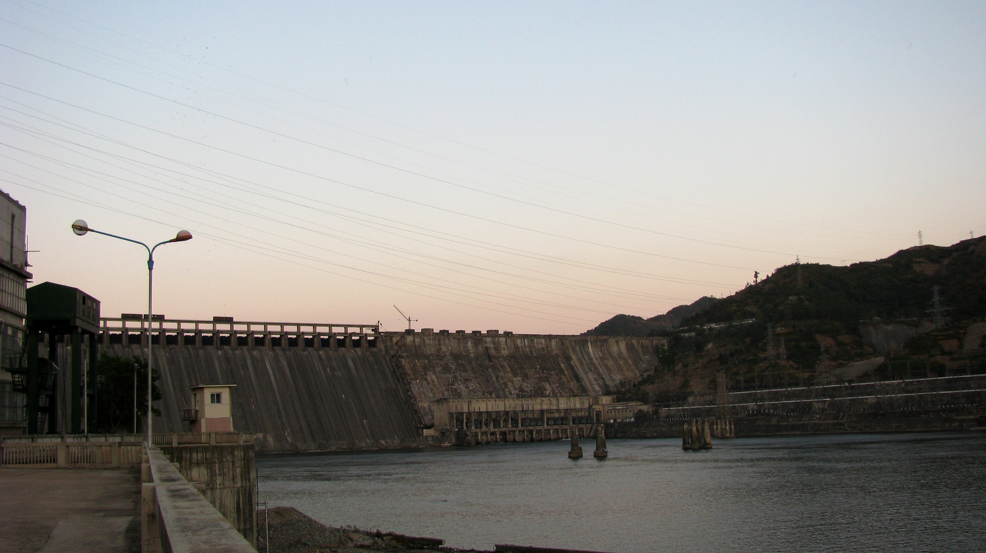 Su'pung Dam in the dusk 黄昏中的水丰电站